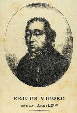 Erik Nissen Viborg (1759-1822), veterinær samt hobbybotaniker